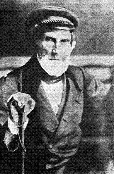 Retrato del cirujano cántabro Diego de Argumosa (1792-1865)